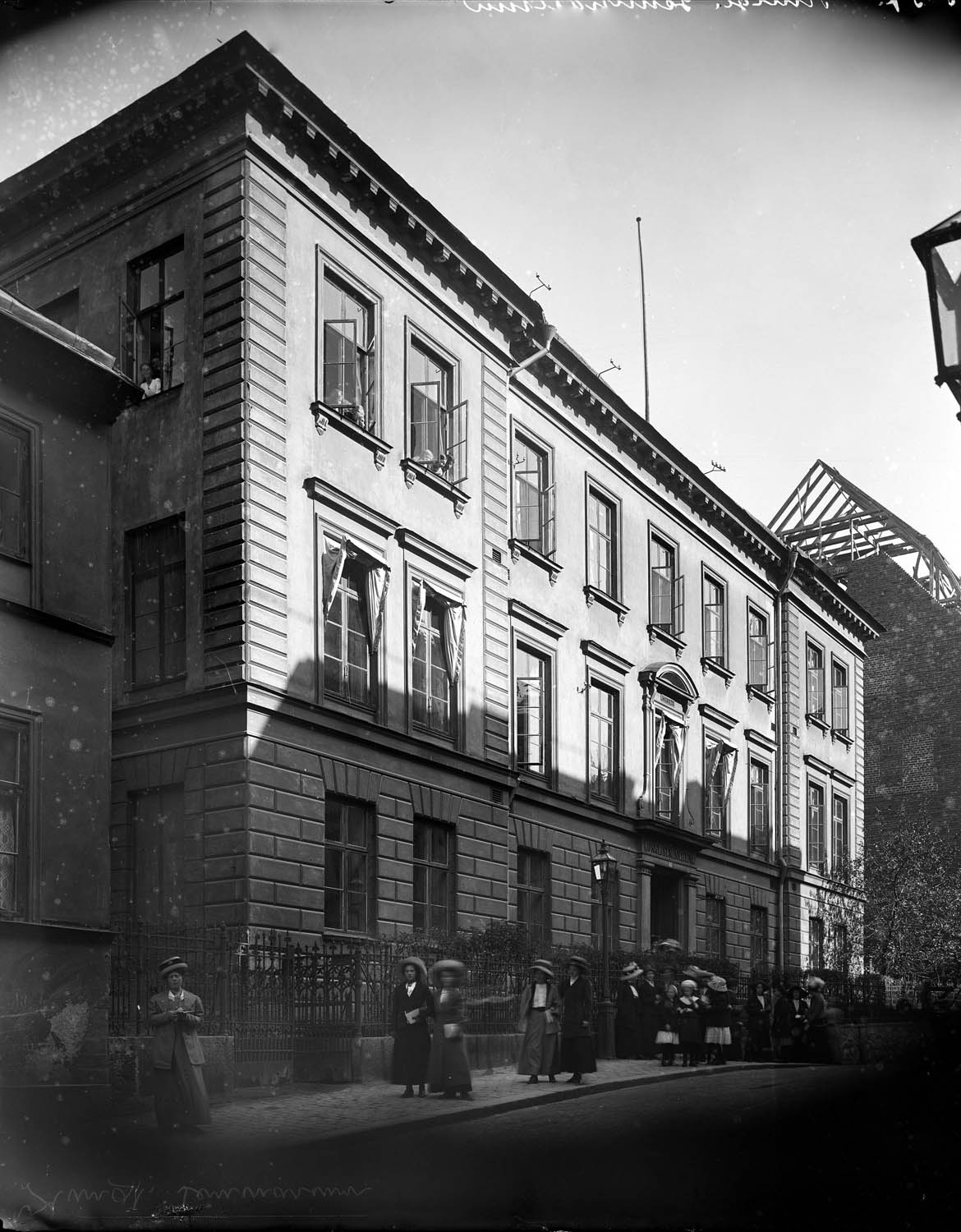 Exteriörbild från Lärarinneseminariet, Riddargatan 6, Stockholm. Buggnaden ritad av Gustaf Sjöberg och uppförd 1871. Utanför på trottoaren går en grupp unga kvinnor, troligen 1910-tal.